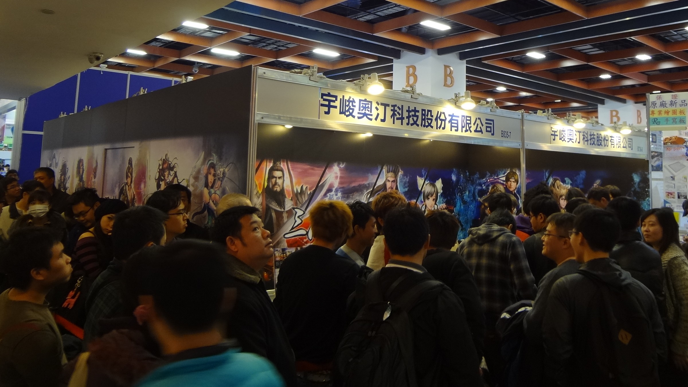 2013年資訊月，宇峻奧汀科技攤位。